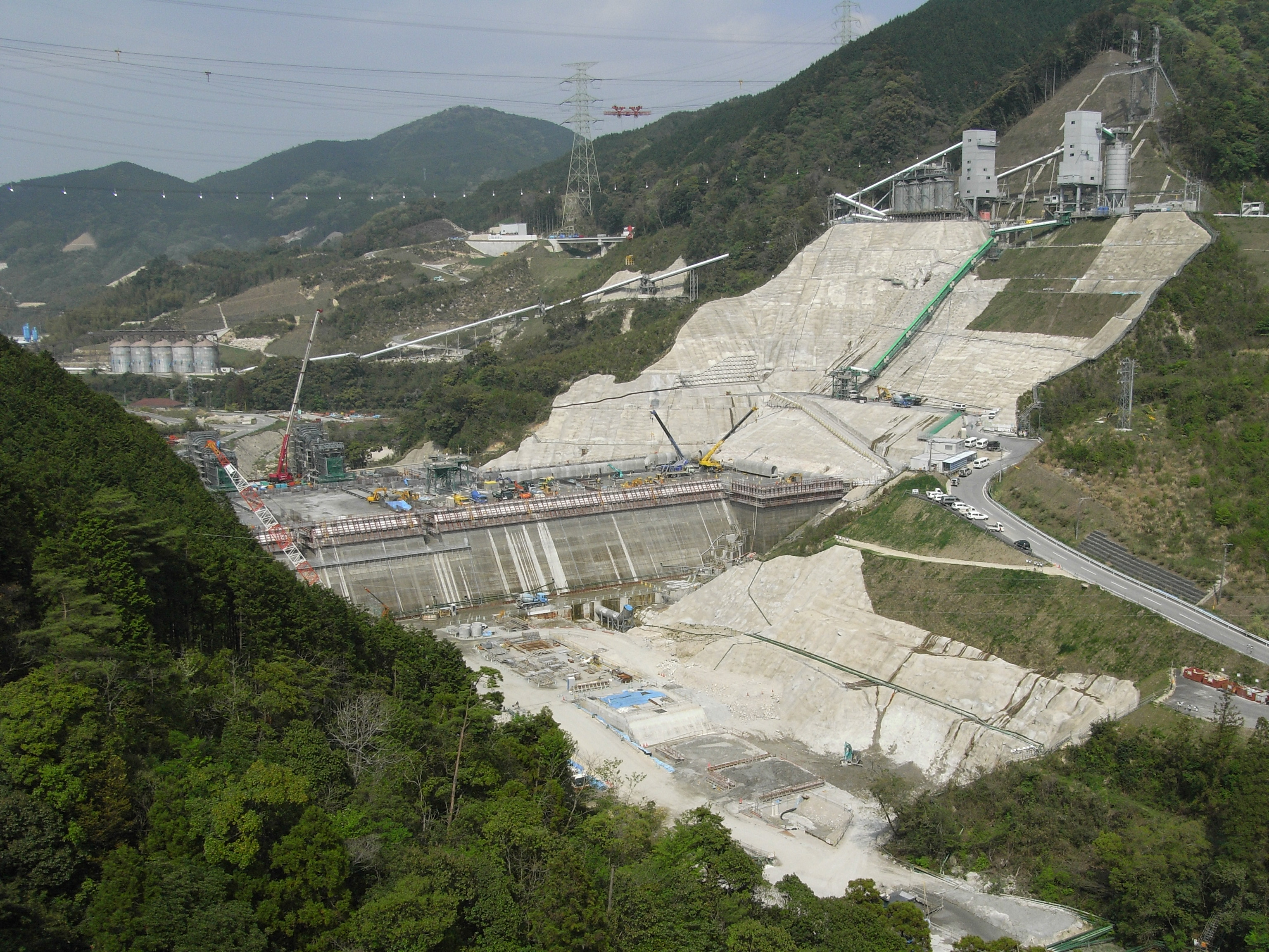 Dam